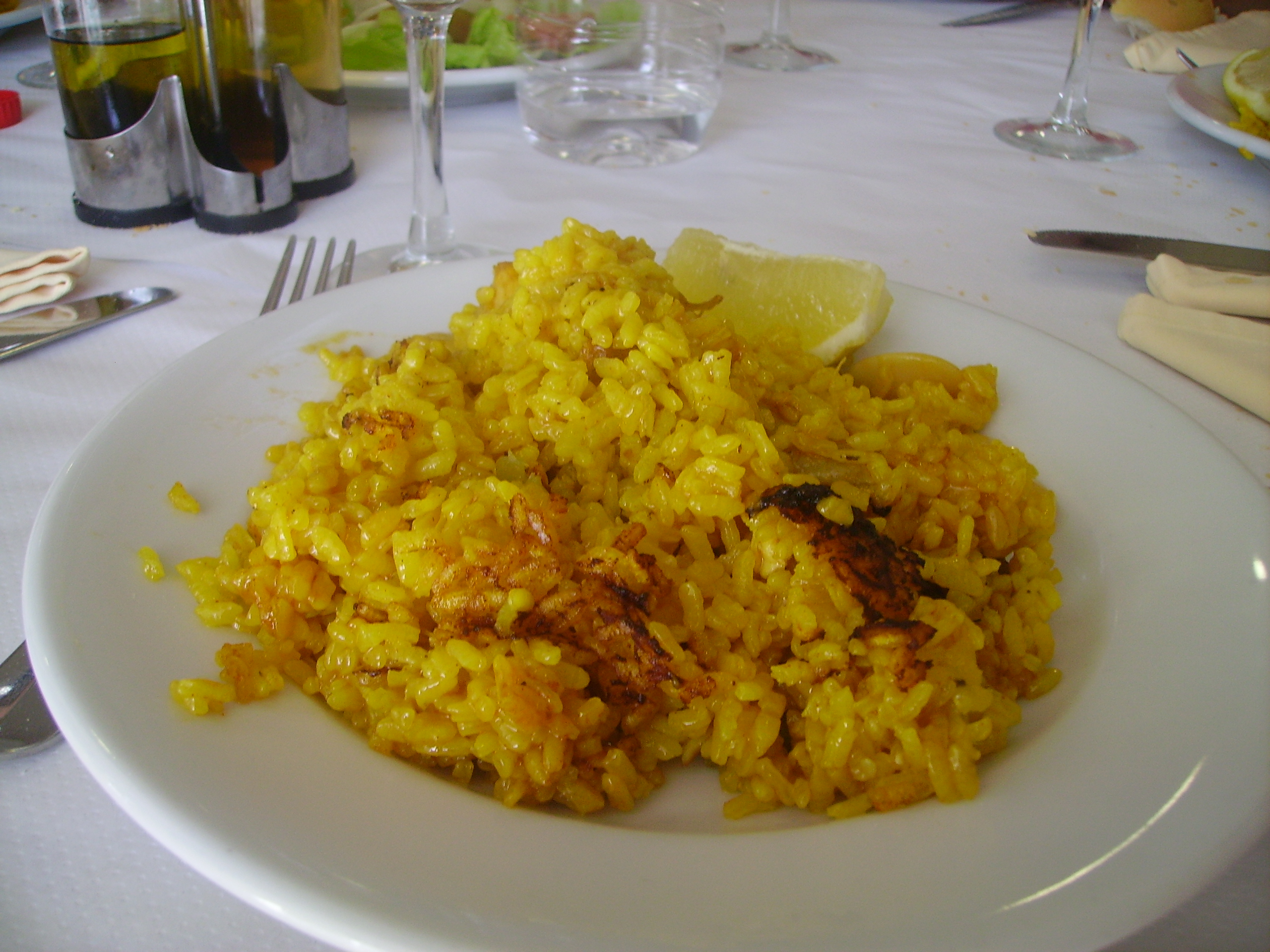 Une paella d'un restaurant valencien.